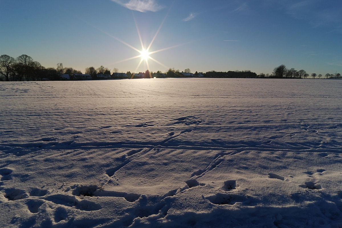 Blick von der Wilhelmshöhe in Unna Richtung Strickherdicke